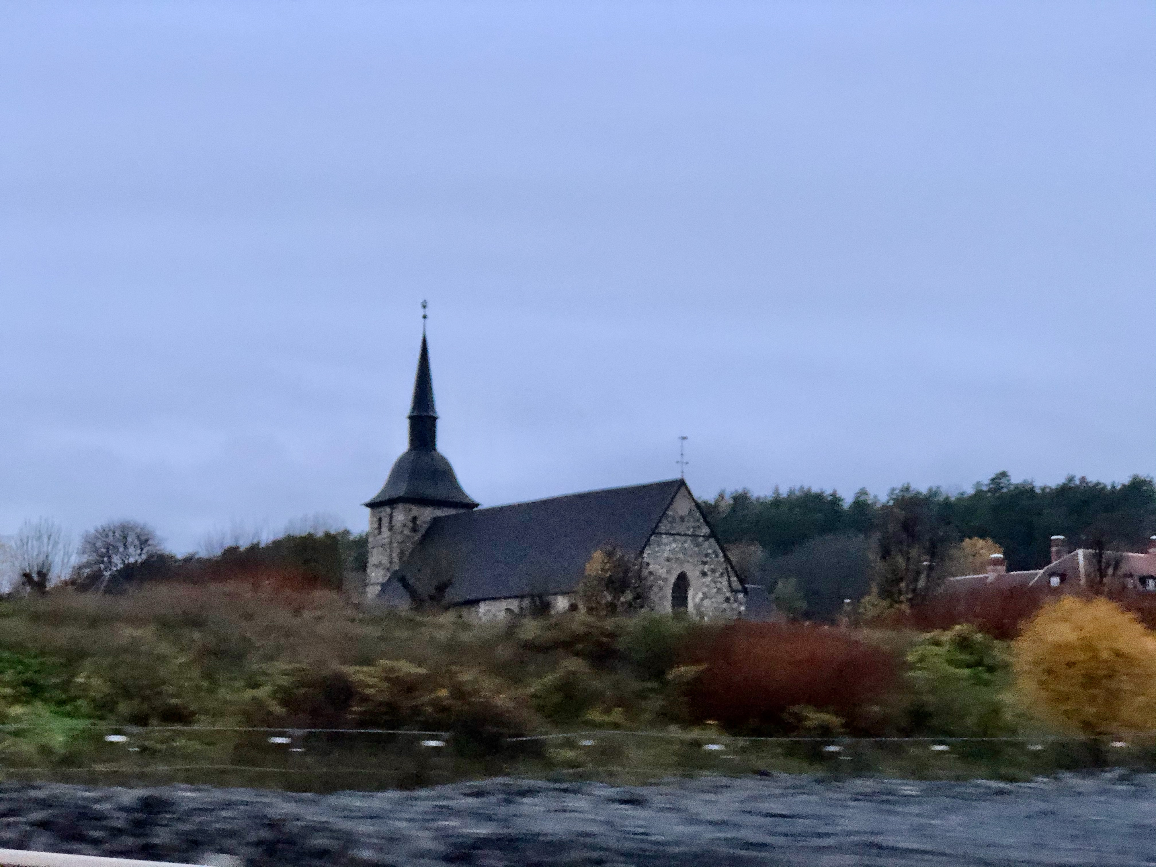 Бортючка кирка